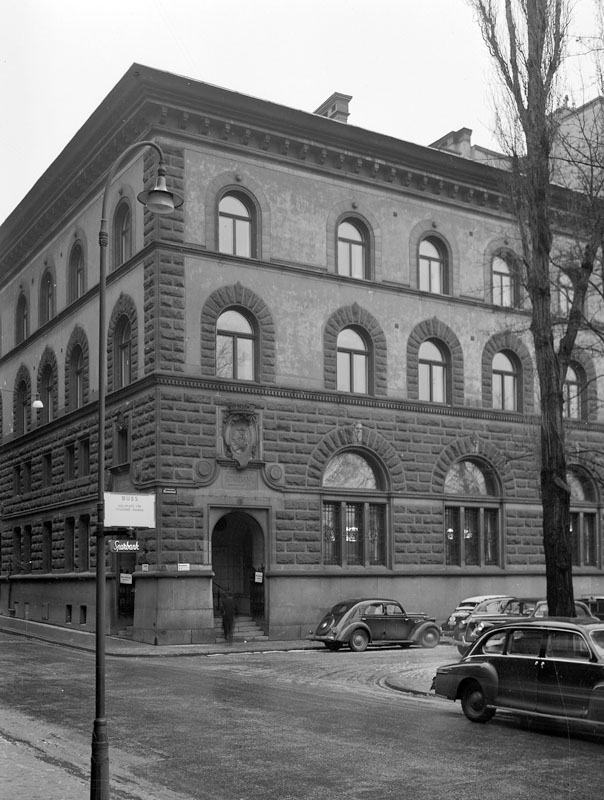 Stockholm stads sparbank 1950